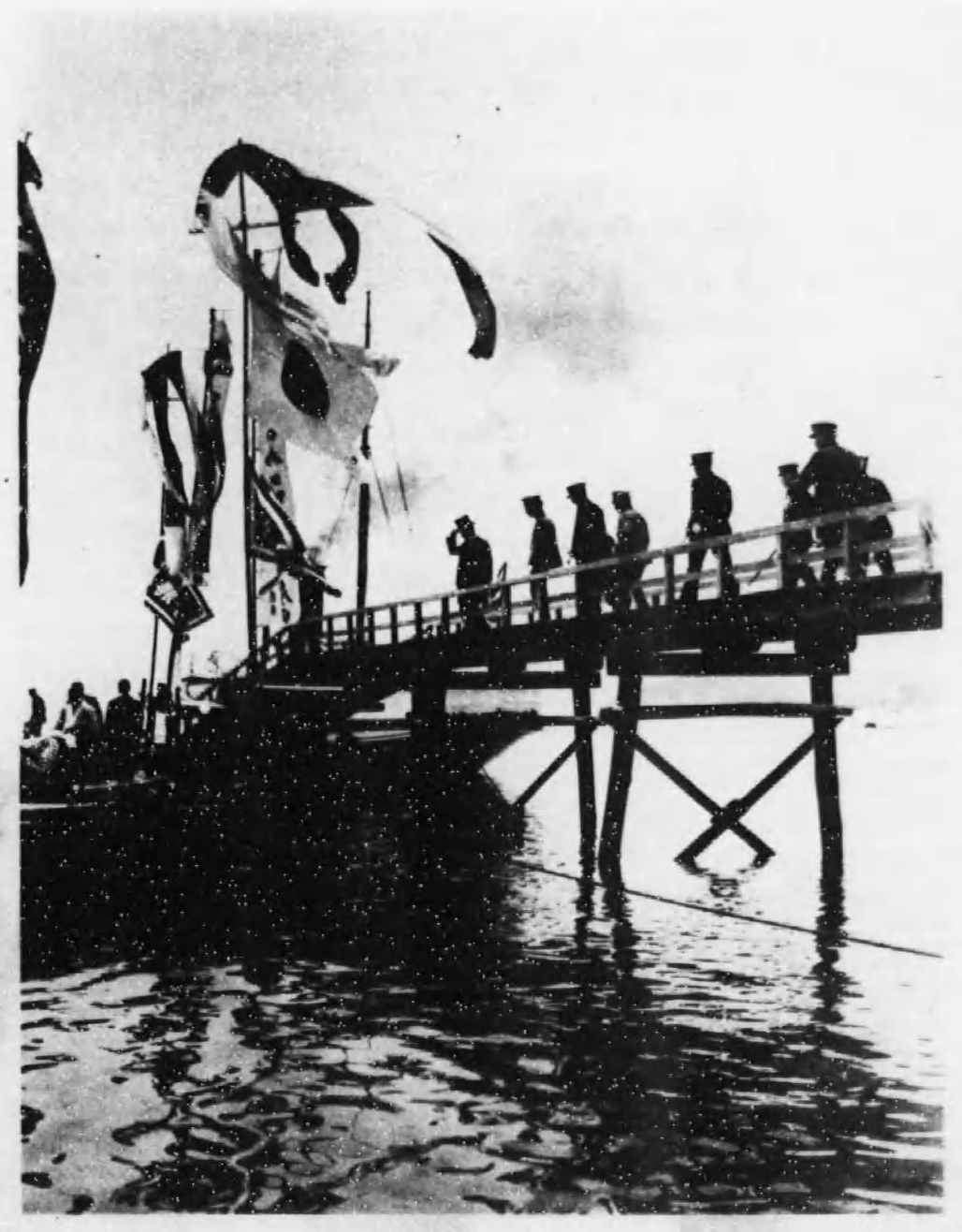 摂政宮、のちの昭和天皇の鞆の浦鯛網台覧興行